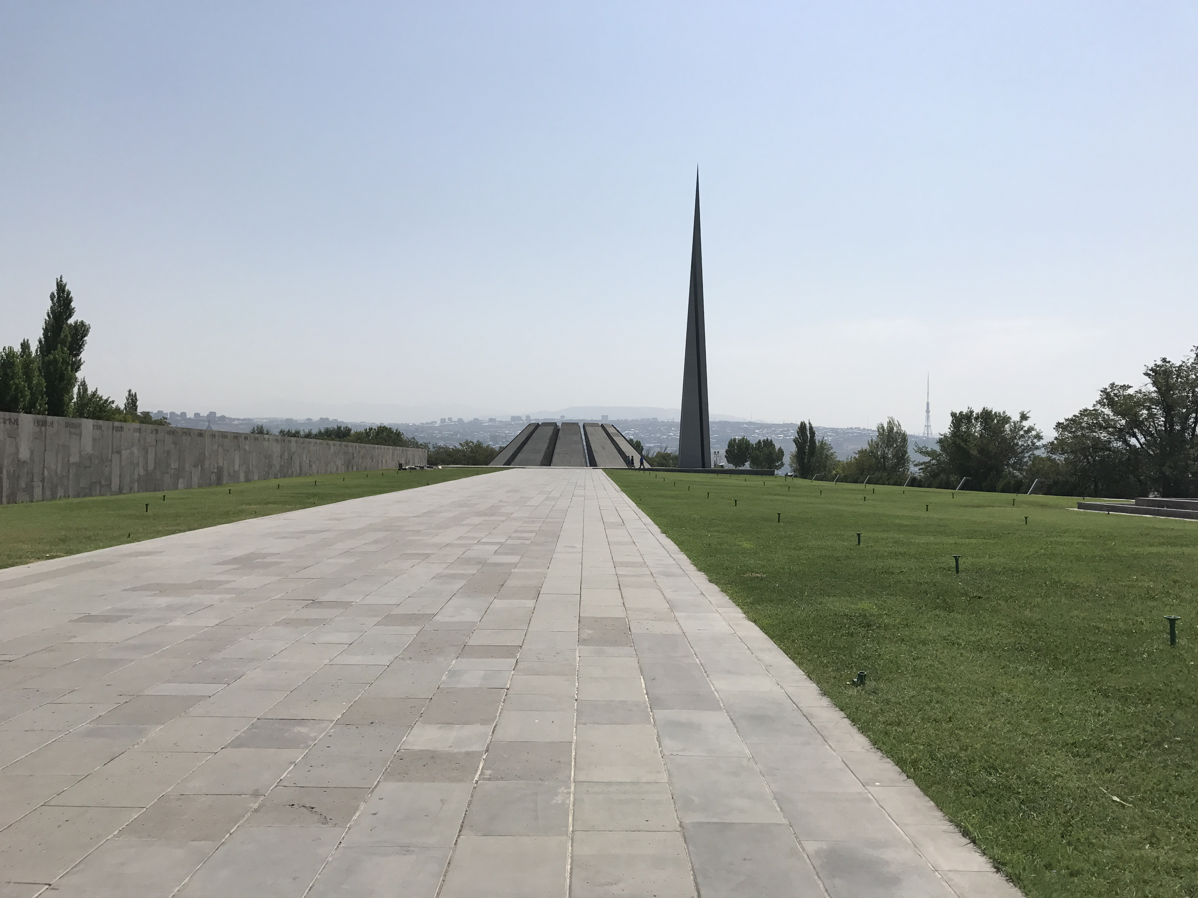 Tsitsernakaberd en juillet 2017.